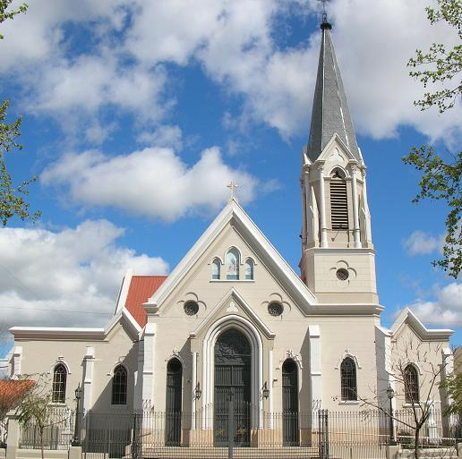 Fachada Iglesia Inmaculada Concepcion de Monte Grande